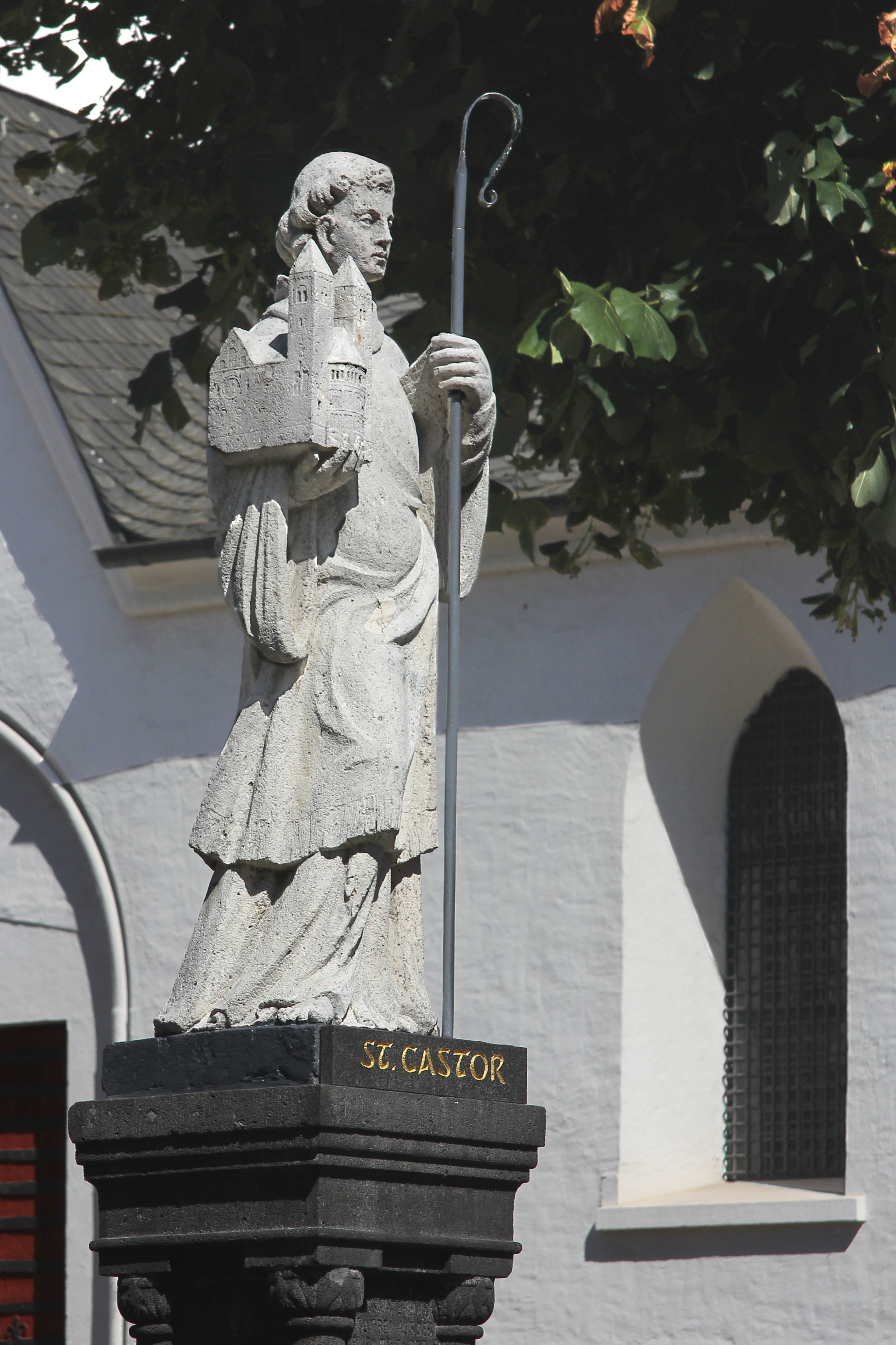 Statue des heiligen Castor auf dem St.-Castor-Brunnen vor der ehemaligen Stiftskirche in Karden. An gleicher Stelle wie der Brunnen stand ein am 30. Juli 1922 eingeweihtes und im Mai 1958 demontiertes Kriegerdenkmal. Die Statue wurde danach in den ehemaligen Kreuzganggarten verbracht. (Quelle: Gustav Klering: 120 Jahre Kardener Geschichte. Gabriele Klein Verlag, Köln 1993, ISBN 3-926135--22-0, S. 130.) Der heutige Brunnen wurde am 2. Oktober 1994 eingeweiht, wieder mit der von dem Bildhauer Helwegen aus Koblenz-Moselweiß geschaffenen Statue. (Quelle: Oswald Hennes: En Koarde ess et schiejn. Treis-Karden, 2000.) Der vollständige Name des Bildhauers ist wahrscheinlich Heinrich Josef (genannt Henri) Helwegen (* 9. Mai 1883 in Roermond, † 13. Mai 1956 in Koblenz).